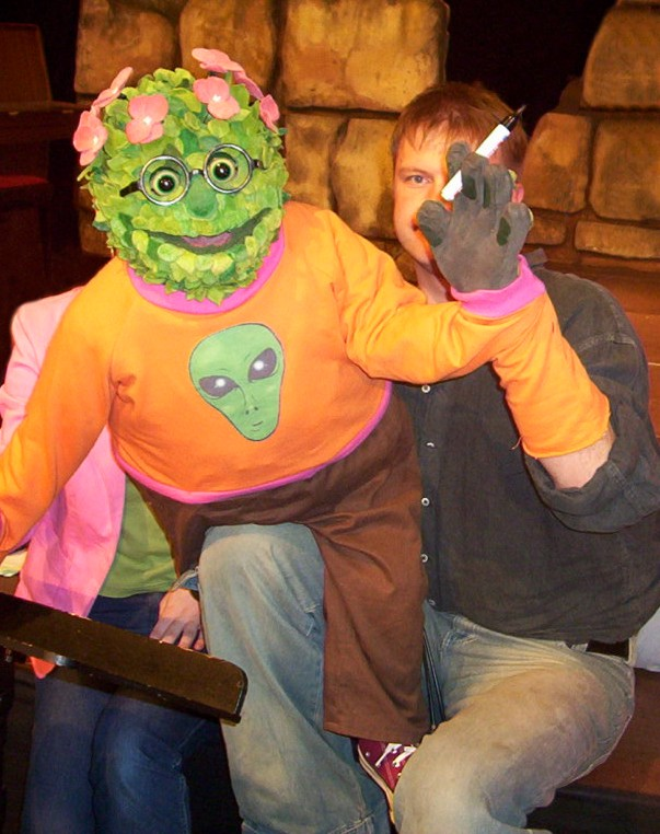 "Briegel der Busch" puppet and puppeteer Jan Mixsa, taken at "1. Fantreffen von Bernd das Brot"